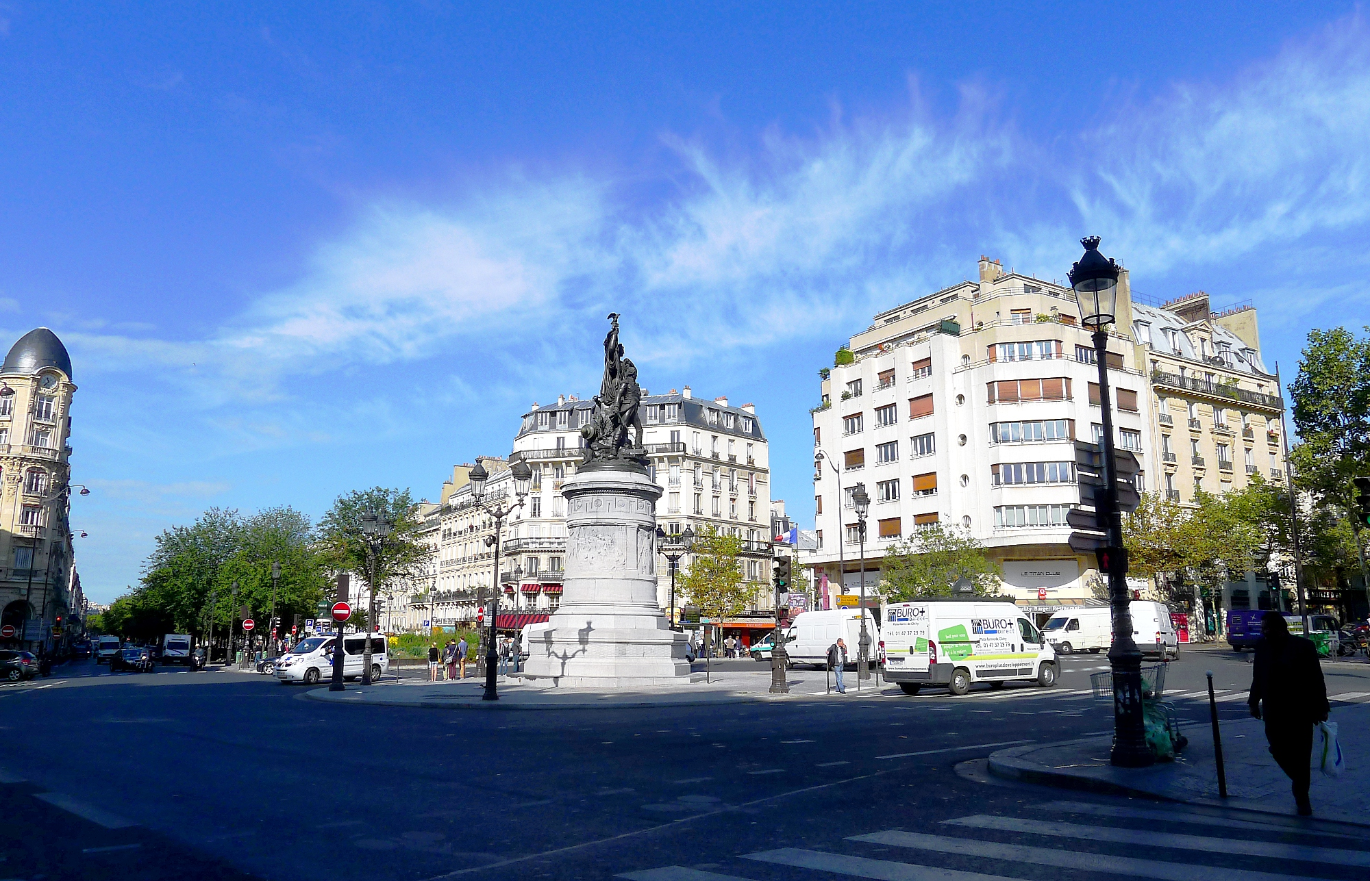 Place de Clichy - Paris VIII-IX-XVII-XVIII